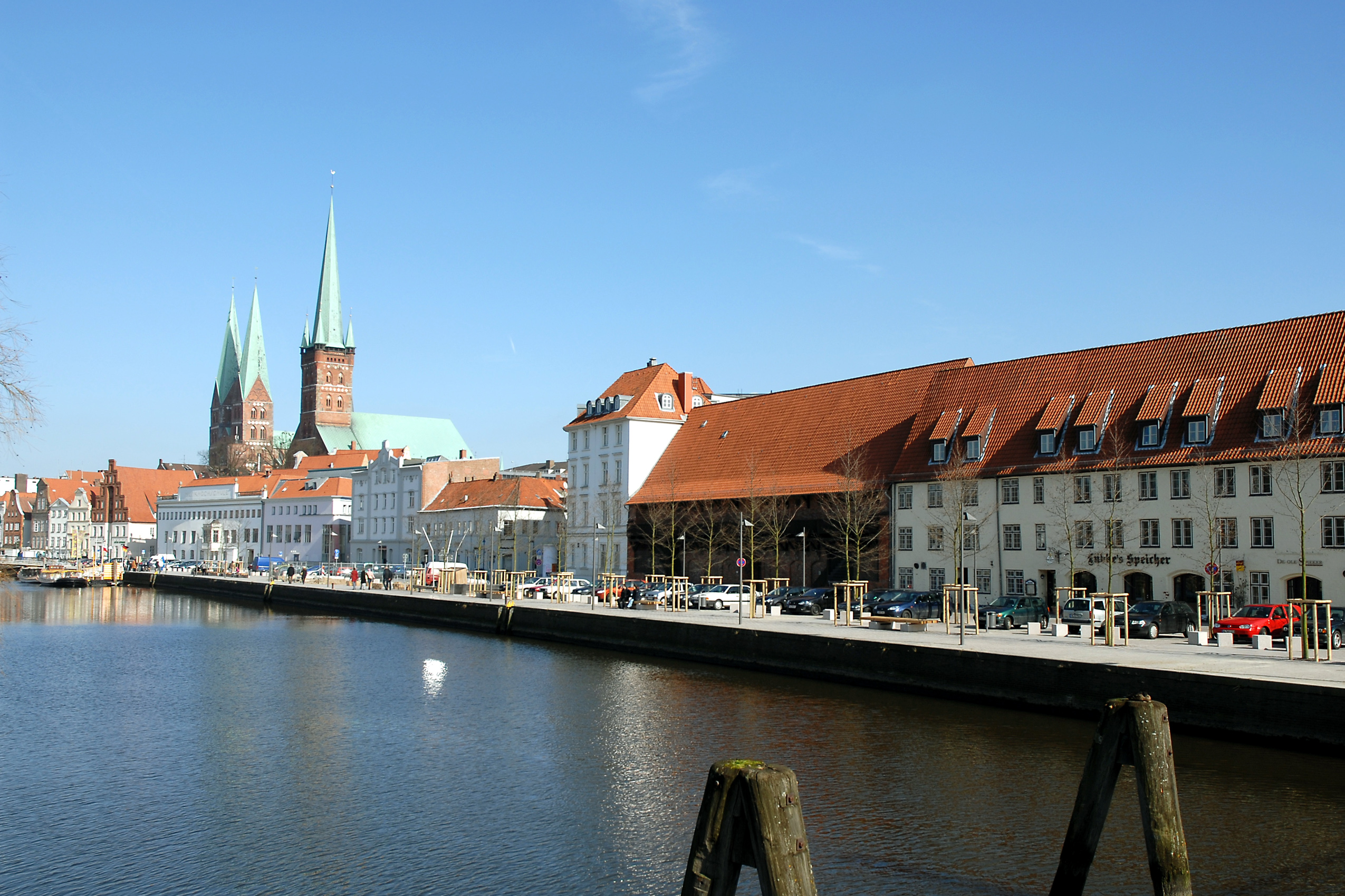 Blick auf die Innenstadt Lübecks von der Dankwartsbrücke aus.